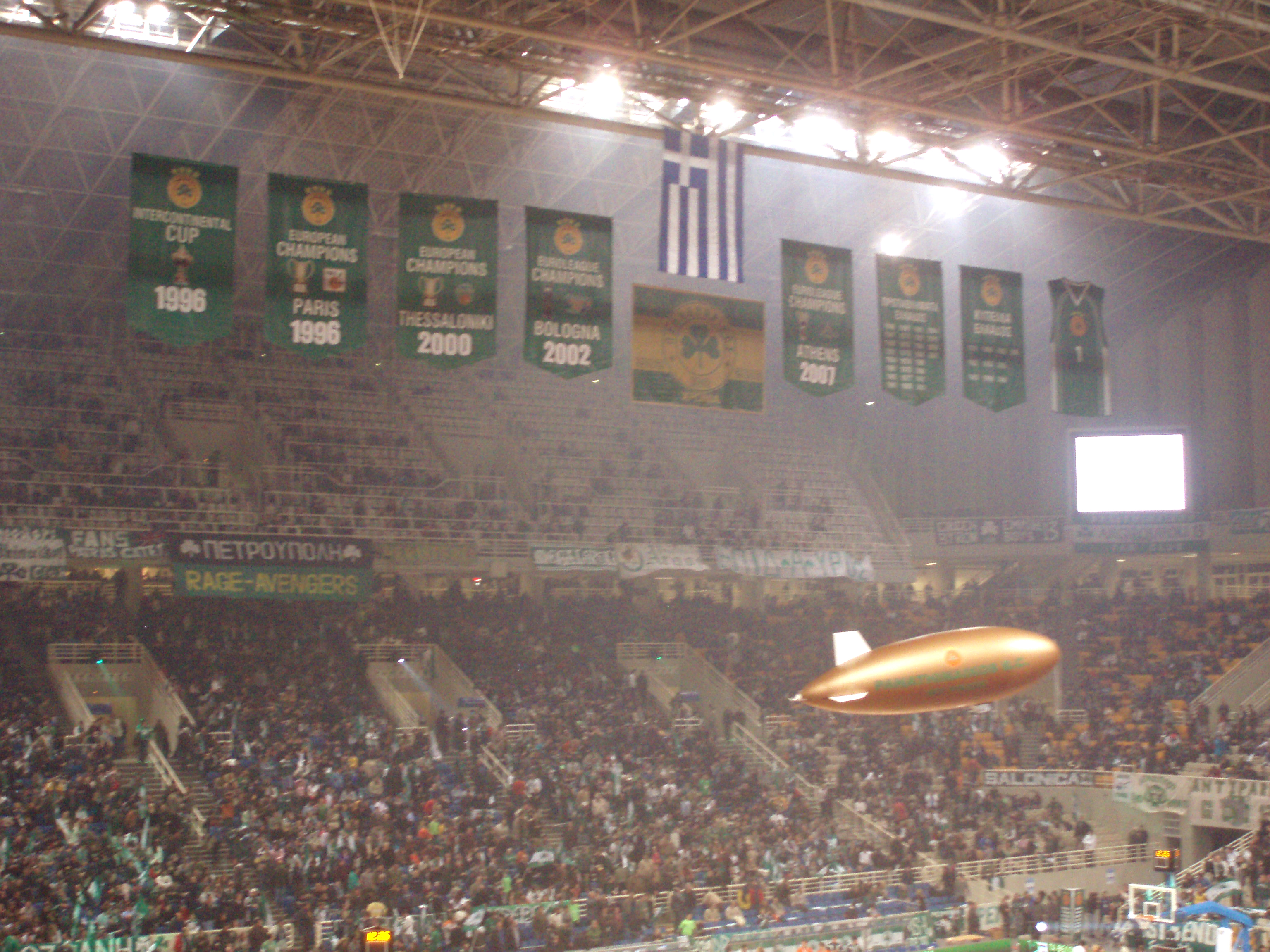 Panathinaikos flags